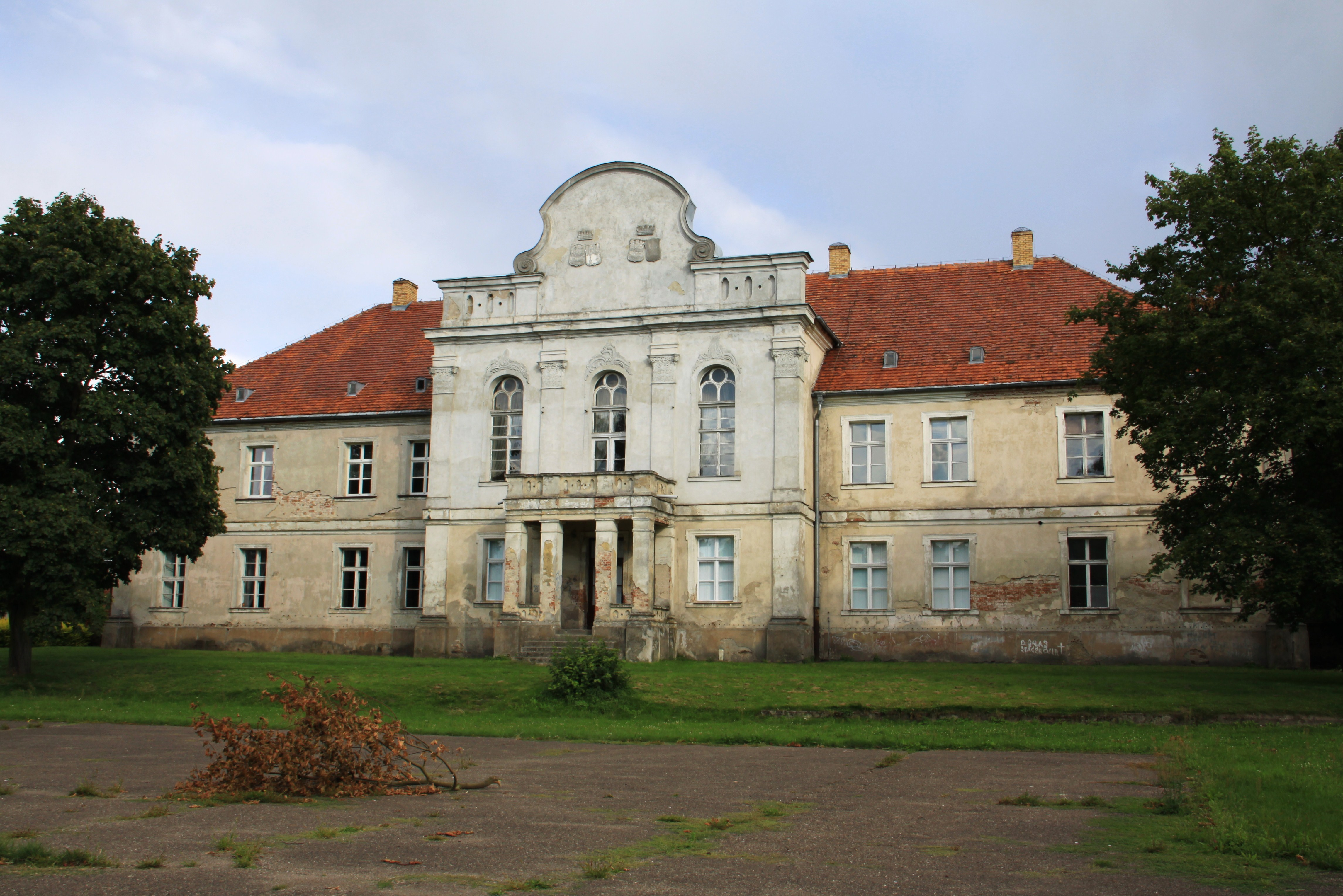 Pniewy, pałac, 1745, zbudowany dla starosty generalnego Wielkopolski Władysława Szołdrskiego